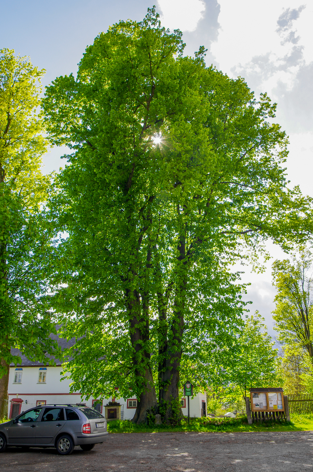 památné stromy - Martinské lípy v Jindřichovicích, okres Sokolov